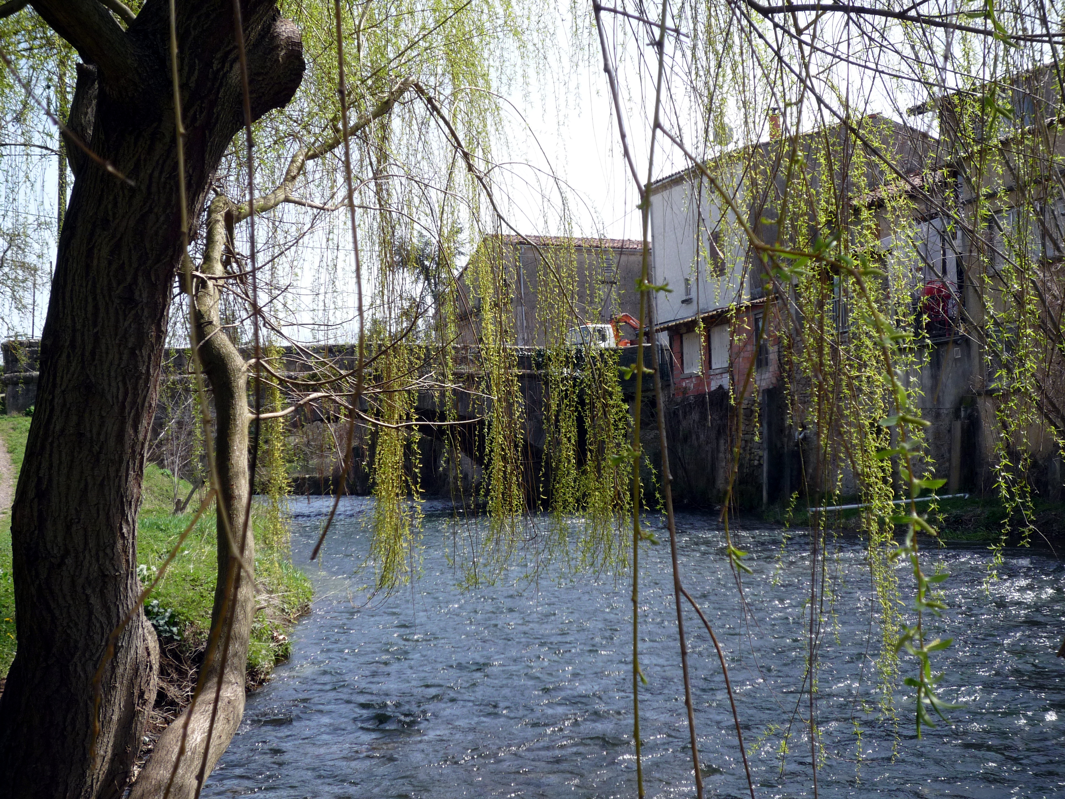 En recherchant sur Wikipédia le nom de la rivière qui coule dans le village de Léran dans le département de l'Ariège j'ai découvert que c'était "Le Touyre", aussi j'ai décidé de prendre cette dernière en photo pour agrémenter votre fichier. Cordialement à vous